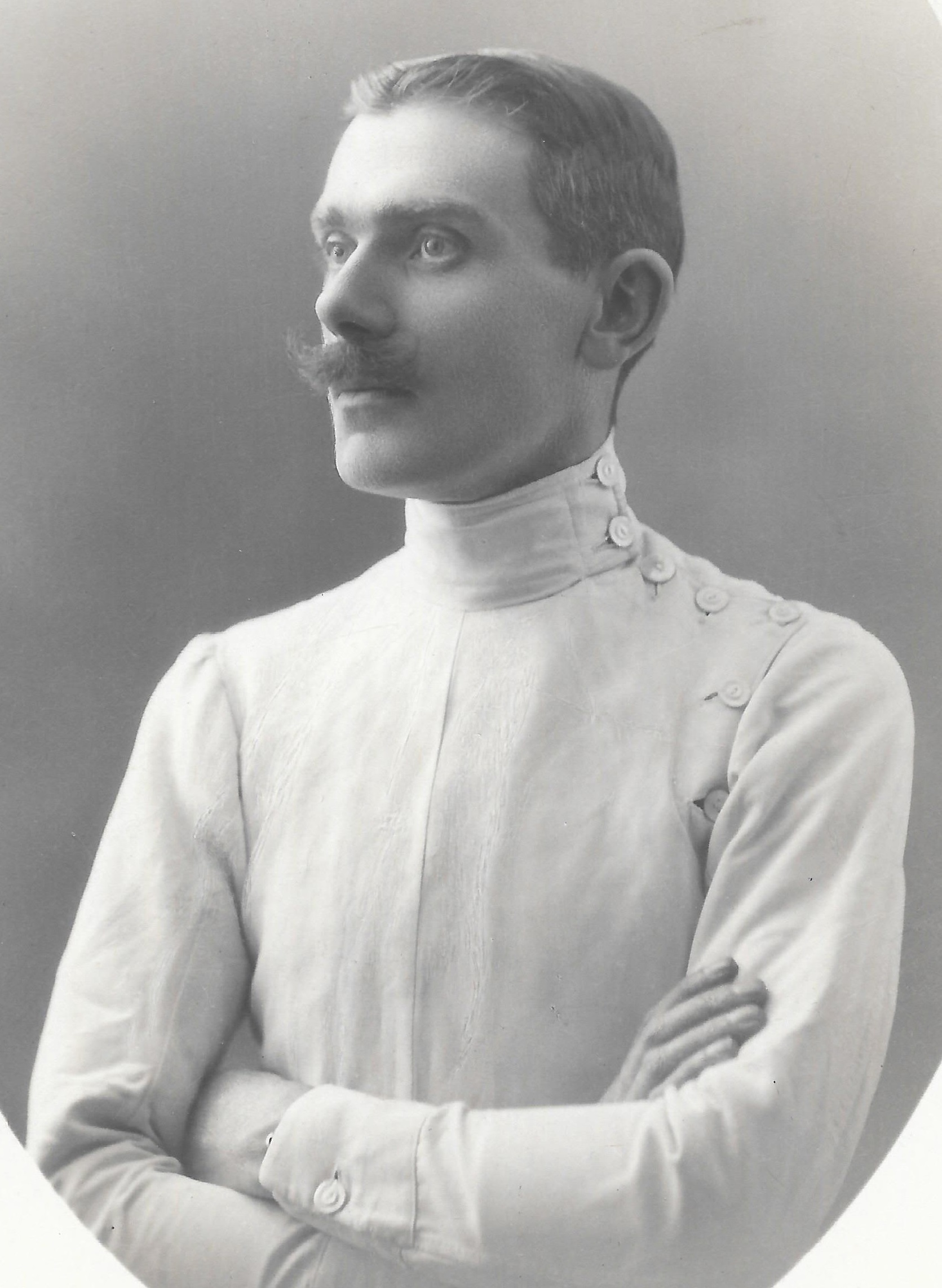 Portrait d'Henri Laurent, champion d'escrime.